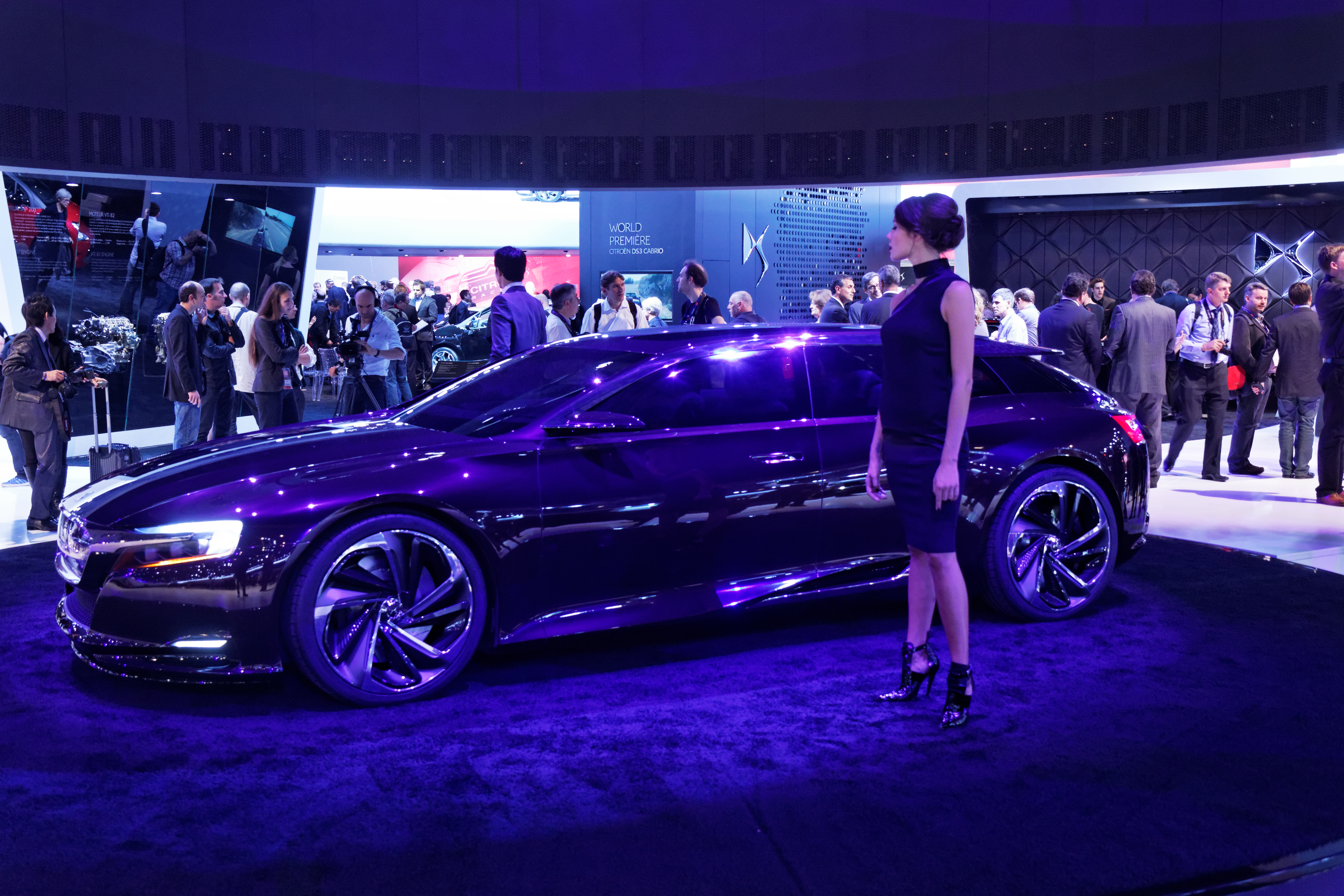 Une Citroën Numéro 9 présentée lors du Mondial de l'Automobile de Paris 2012.